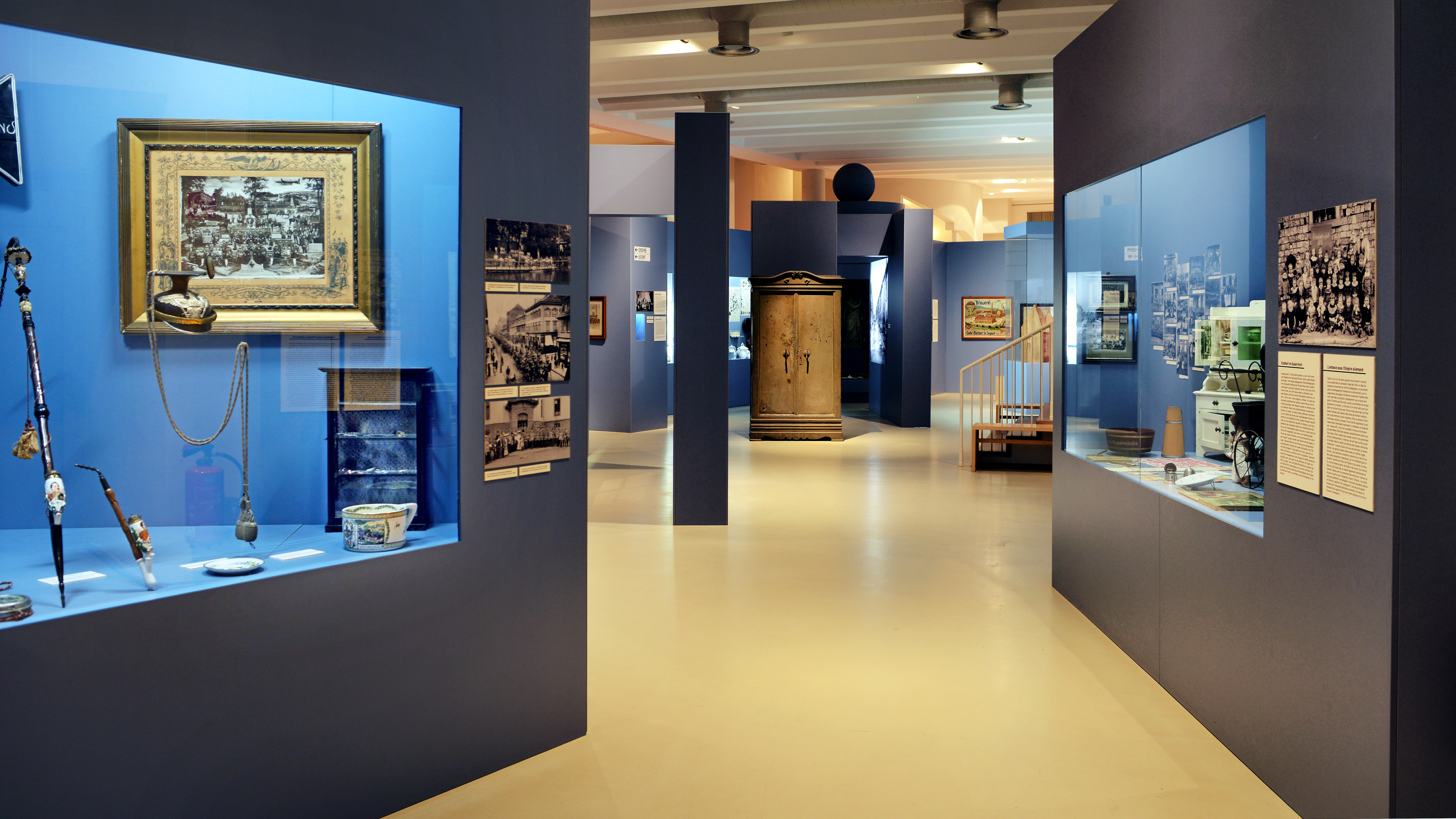 Ansicht zum Ausstellungsbereich zur "Kaiserzeit" © Historisches Museum Saar, Thomas Roessler